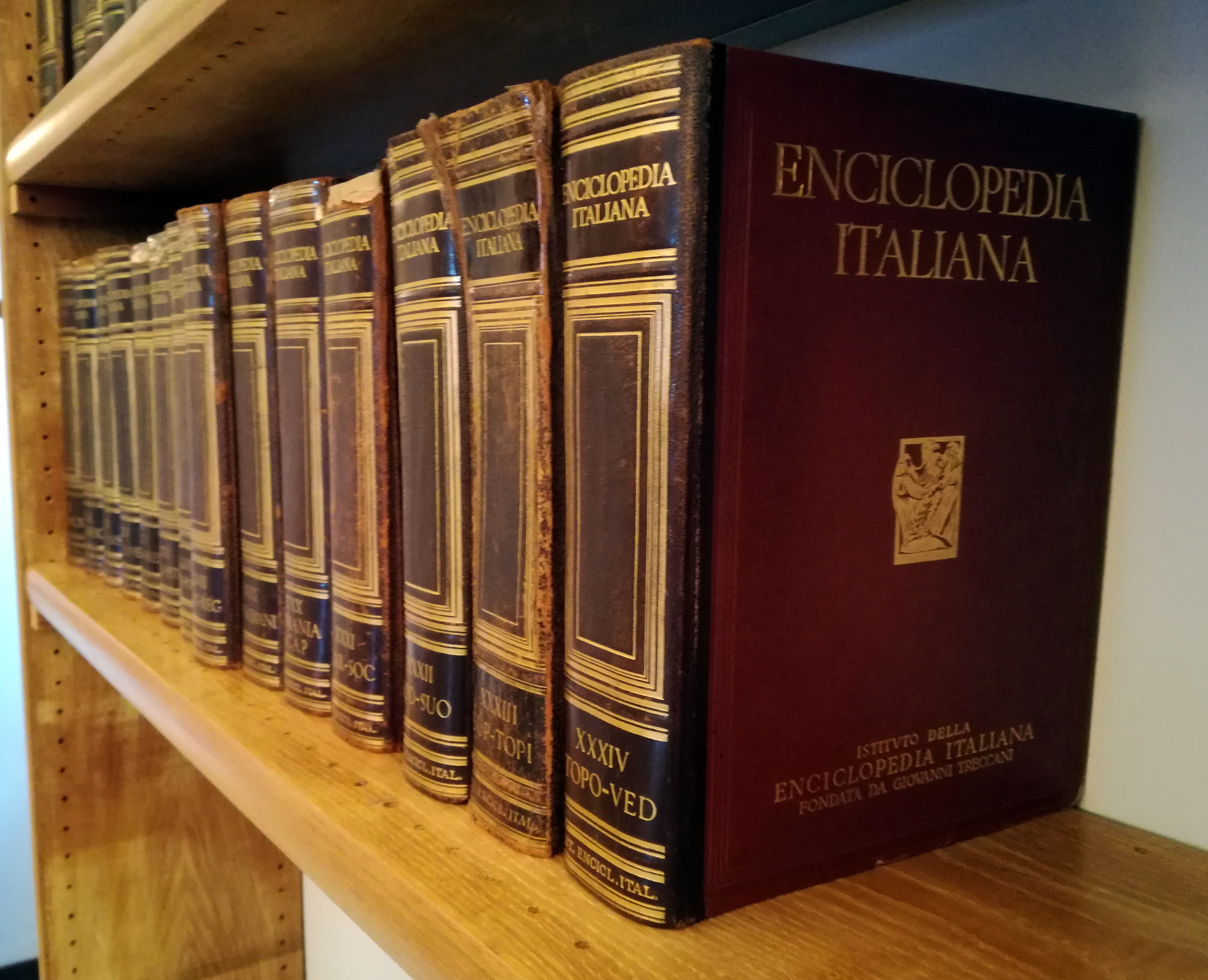 Alcuni volumi dell'Enciclopedia Italiana in una biblioteca di Giulianova